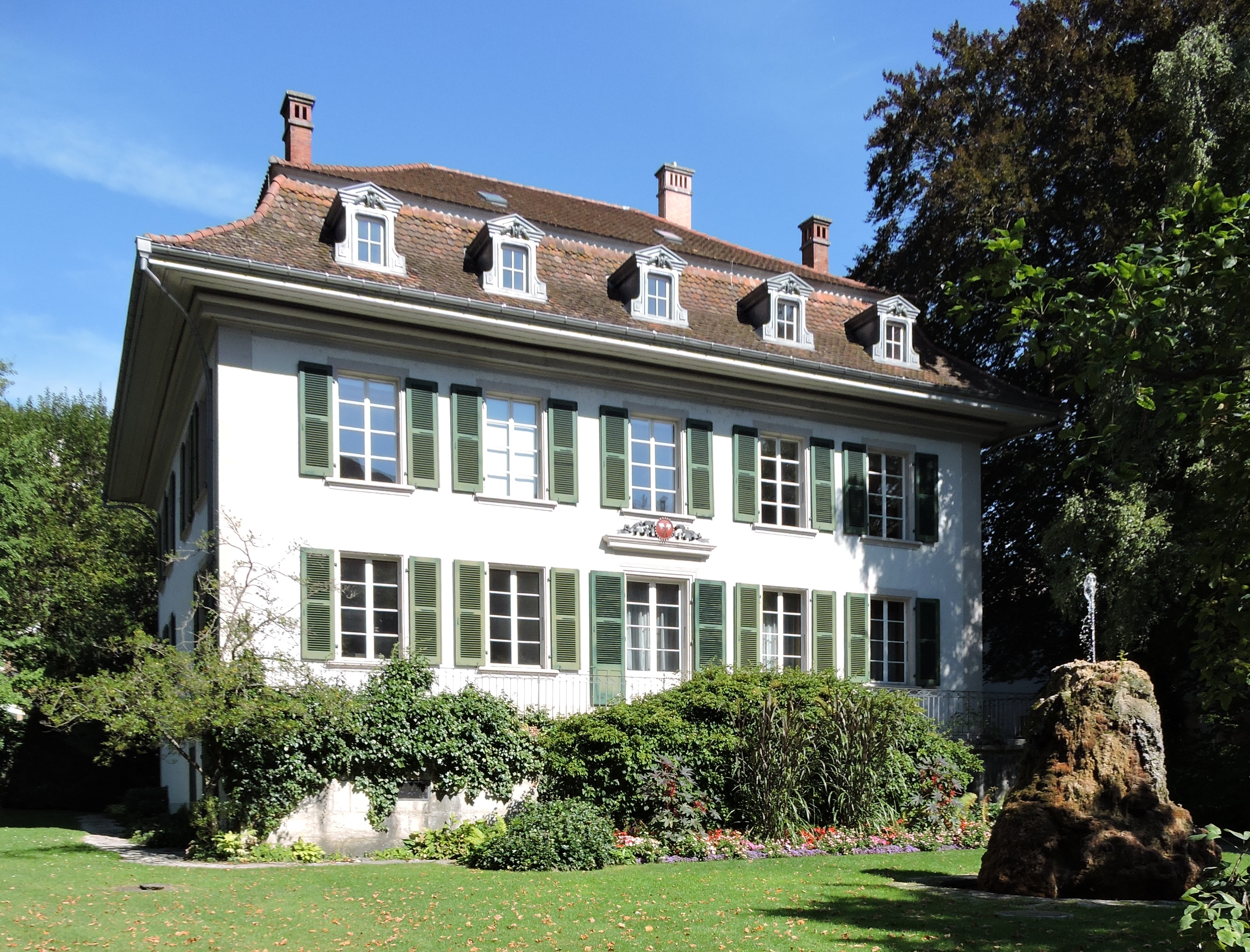 Blöschhaus, Mühlebrücke 5 in Biel. Aktuelle Funktion (2015): Stadtkanzlei.